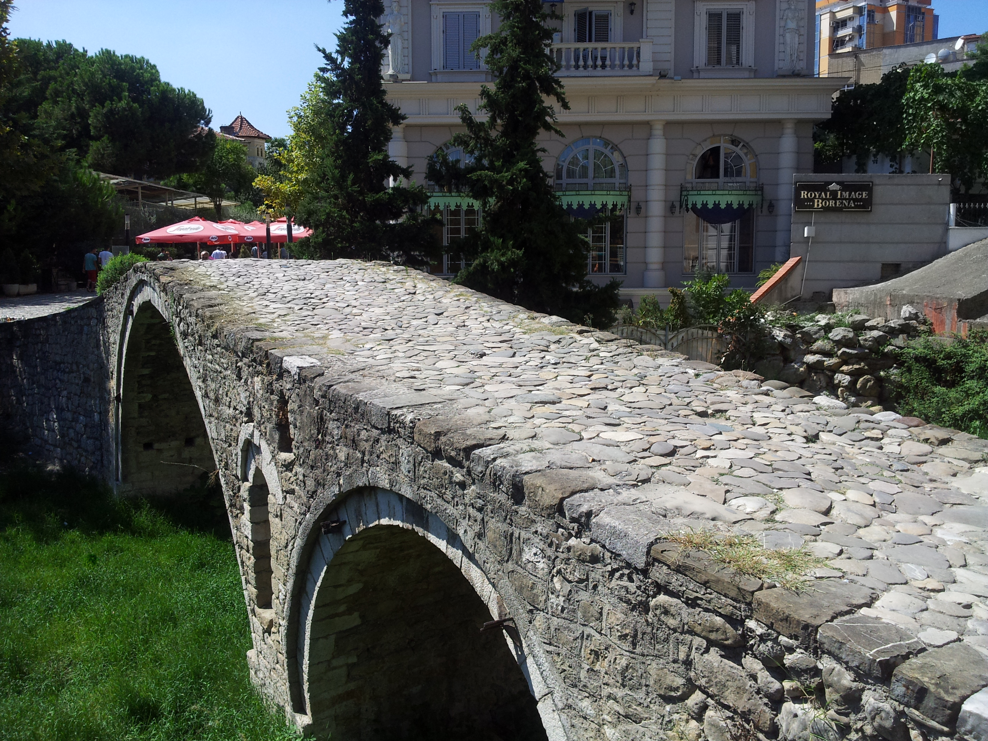 Ura e Tabakeve është monument kulture i kategorisë së parë